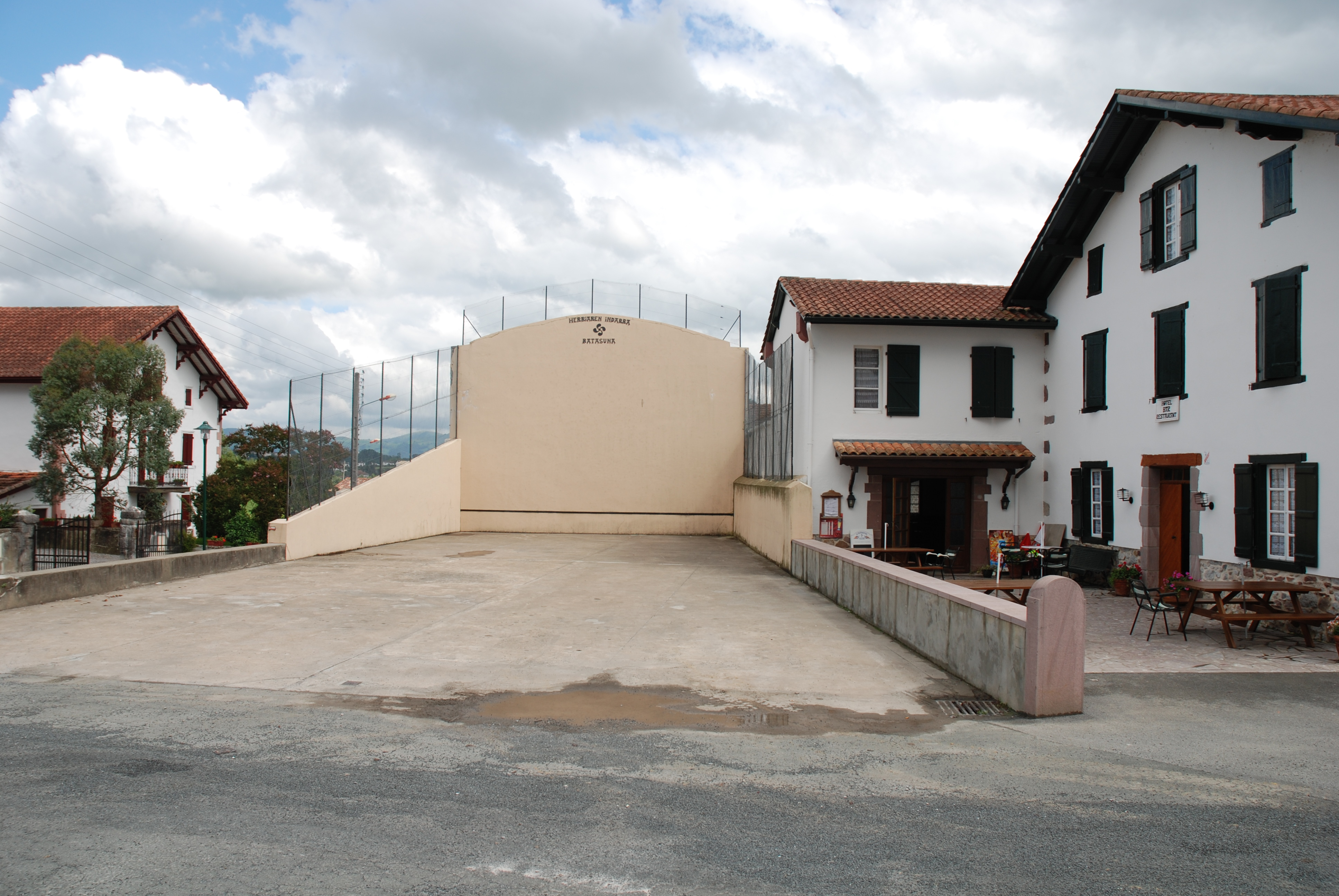 Lasse, fronton place libre